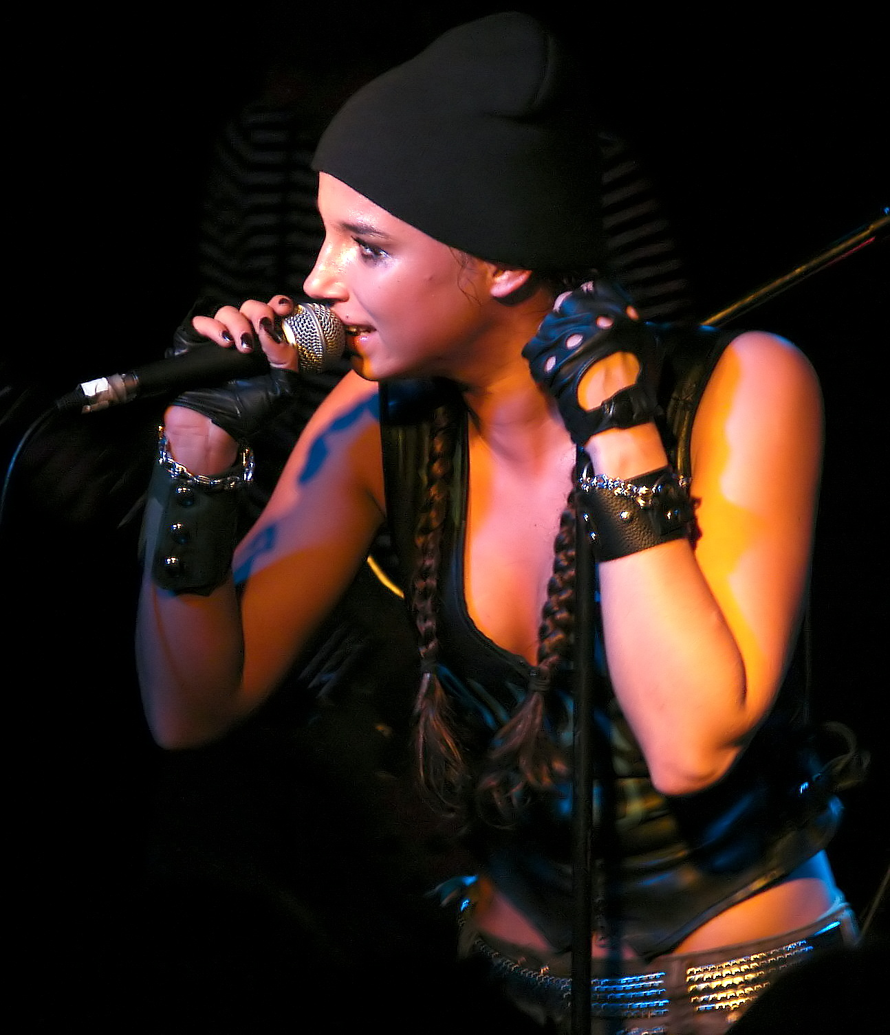 Liza Li - Underground Köln